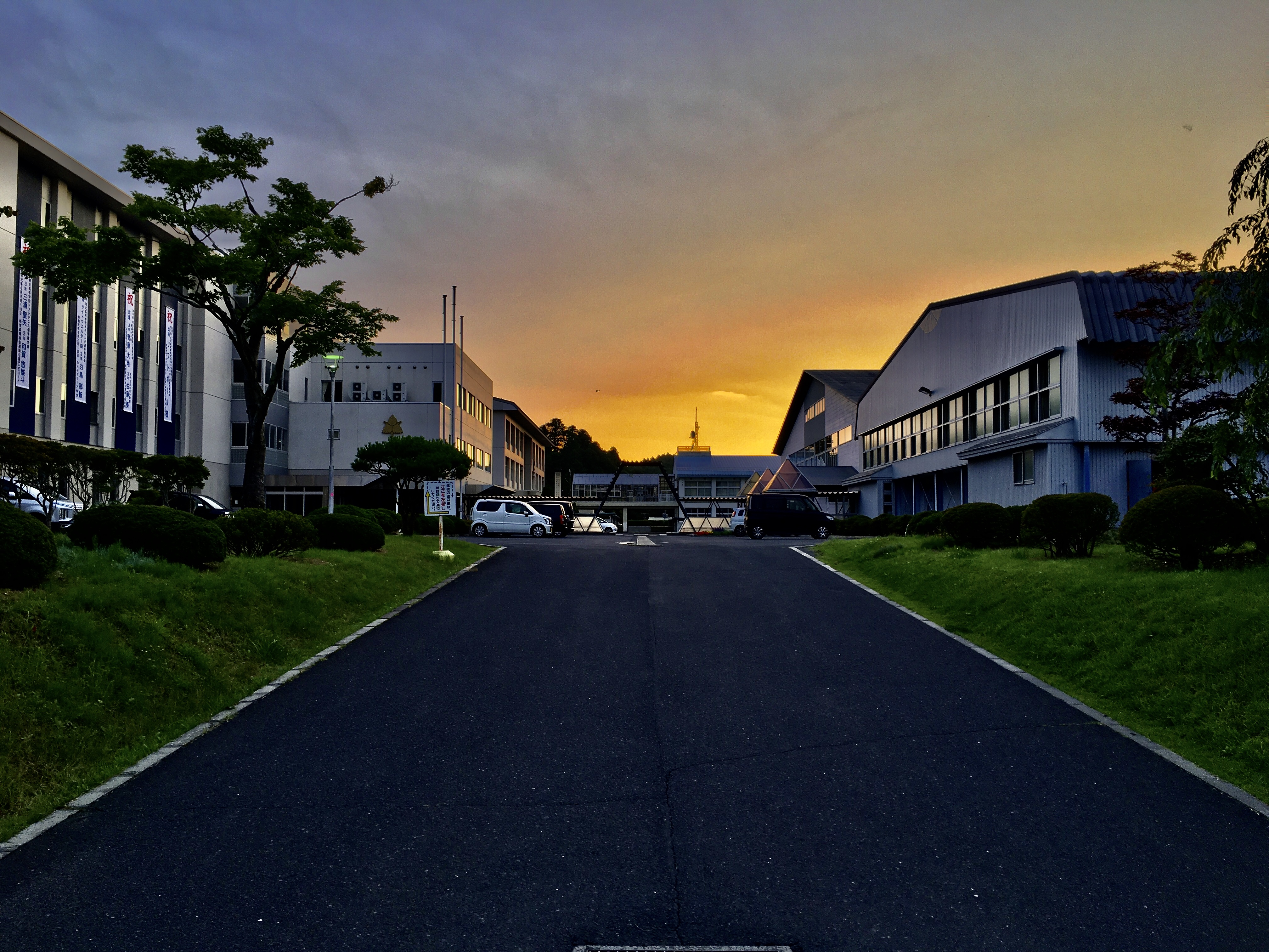 岩手県立千厩高等学校